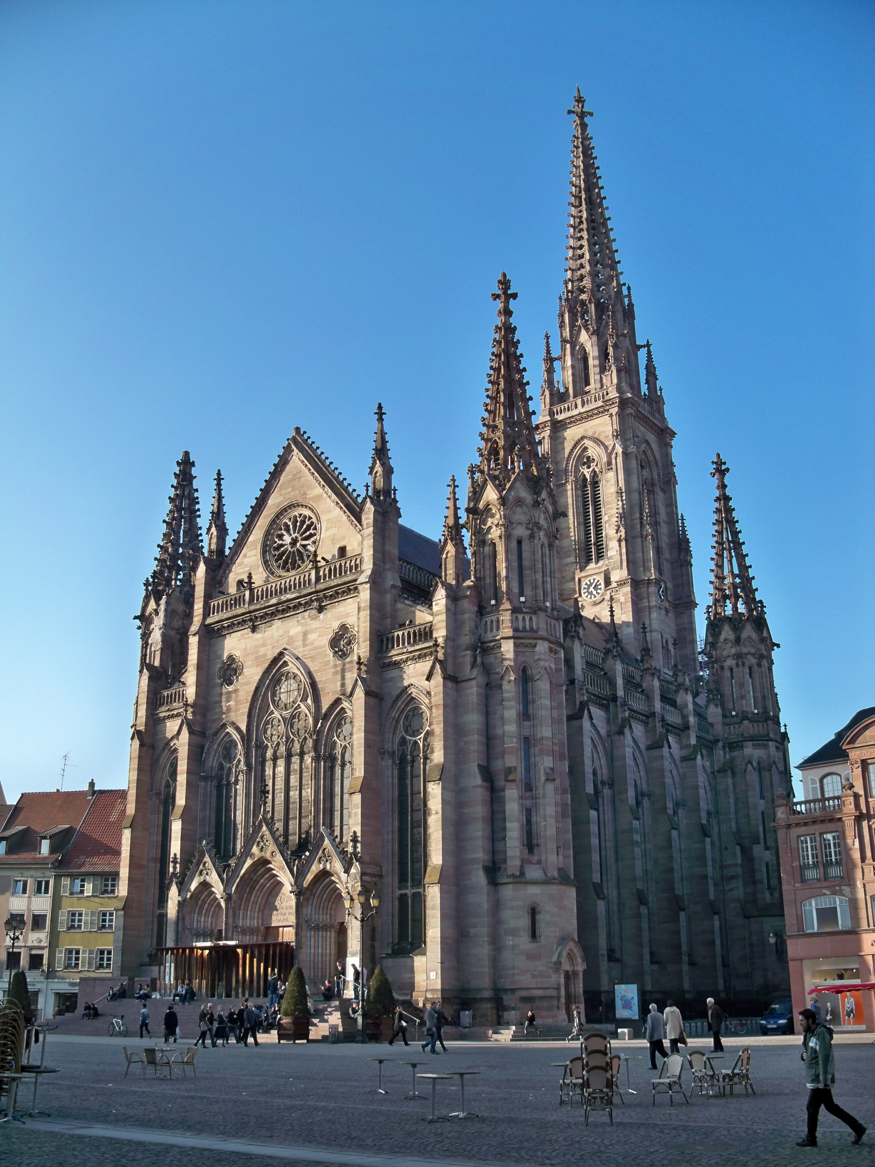 Église médiévale Saint-Étienne, Place de la Réunion